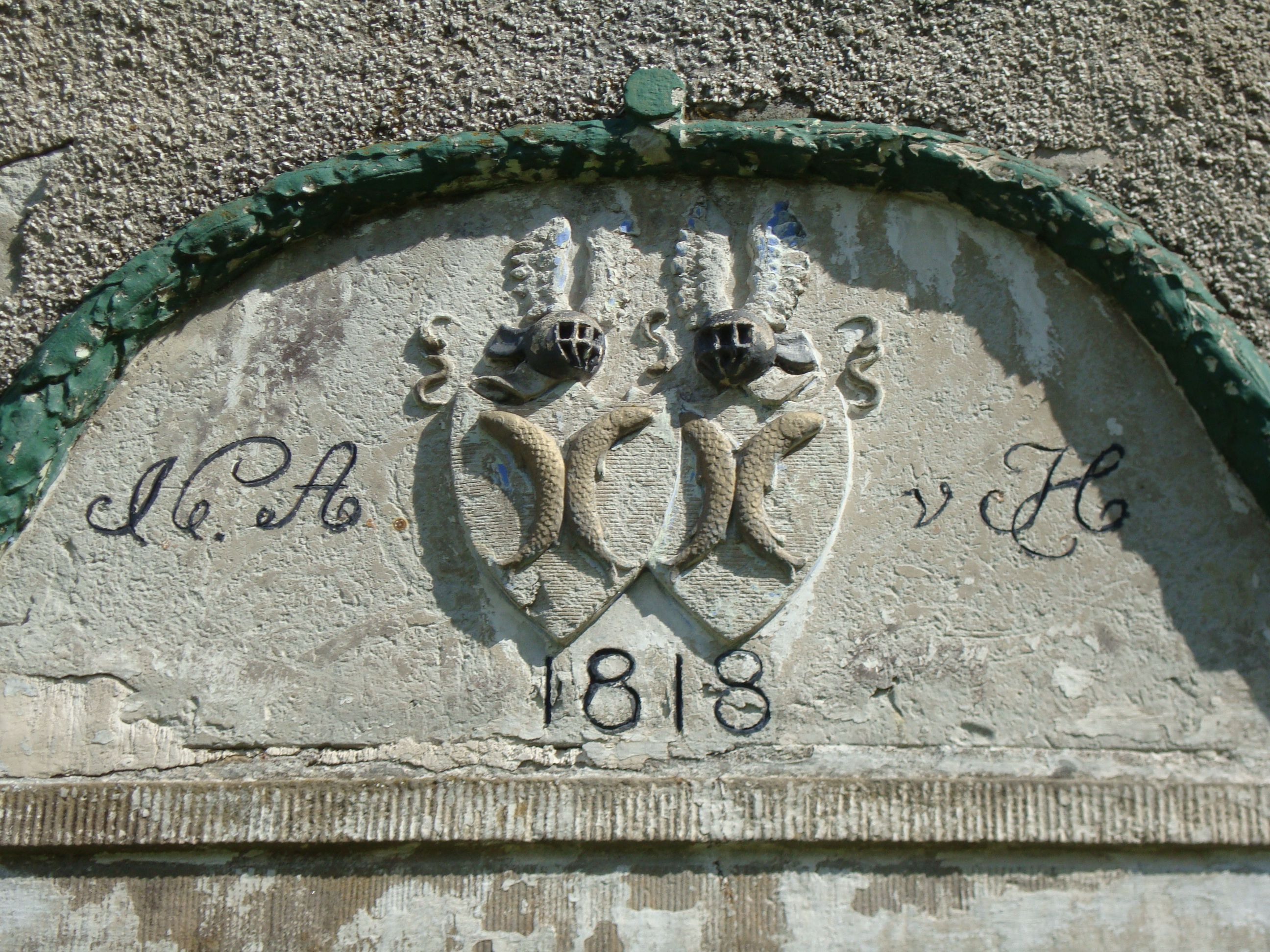 Detail am ehemaligen Rittergut in Dorfchemnitz im Erzgebirge (erbaut 1818 von Hans Adolph von Hartitzsch)